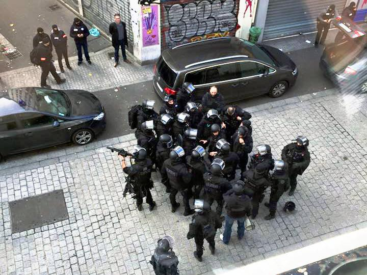 L'intervention policière à Saint-Denis contre un logement de terroristes présumés rue du Corbillon le 18 novembre. Vue de la rue de la République Saint-Denis